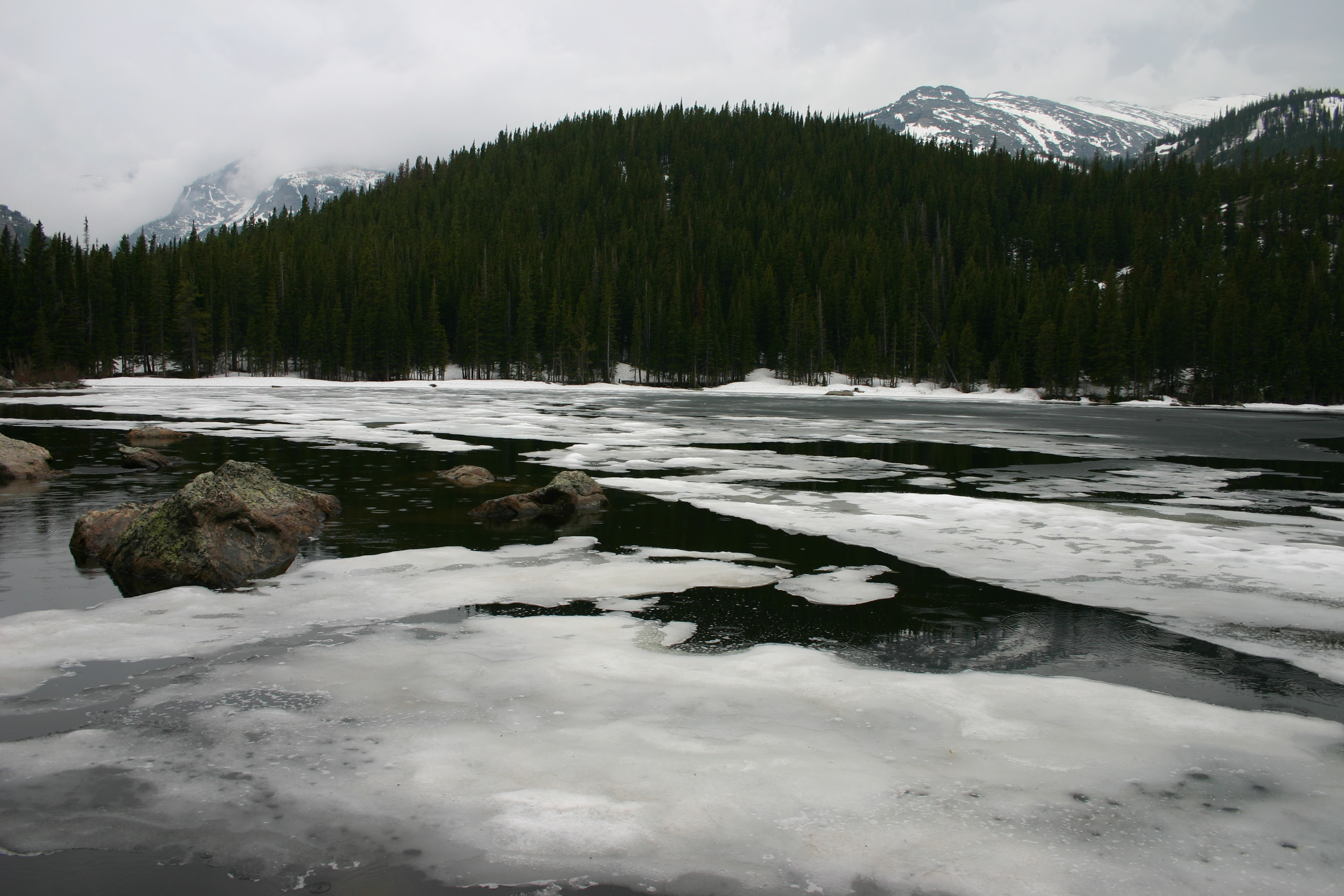 Bear Lake in Spring